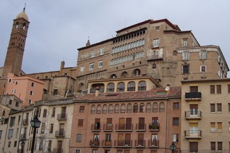 Palacio episcopal e iglesia de Sta Maria Magdalena, Bishop palace and Sancta Maria Magdalena church